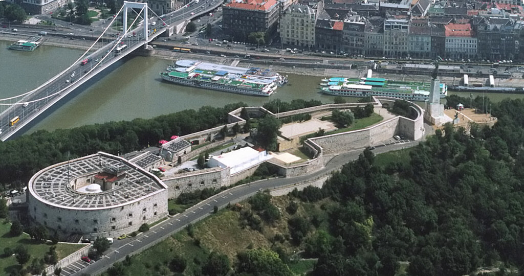 Citadel - Budapest - Hungary - Europe